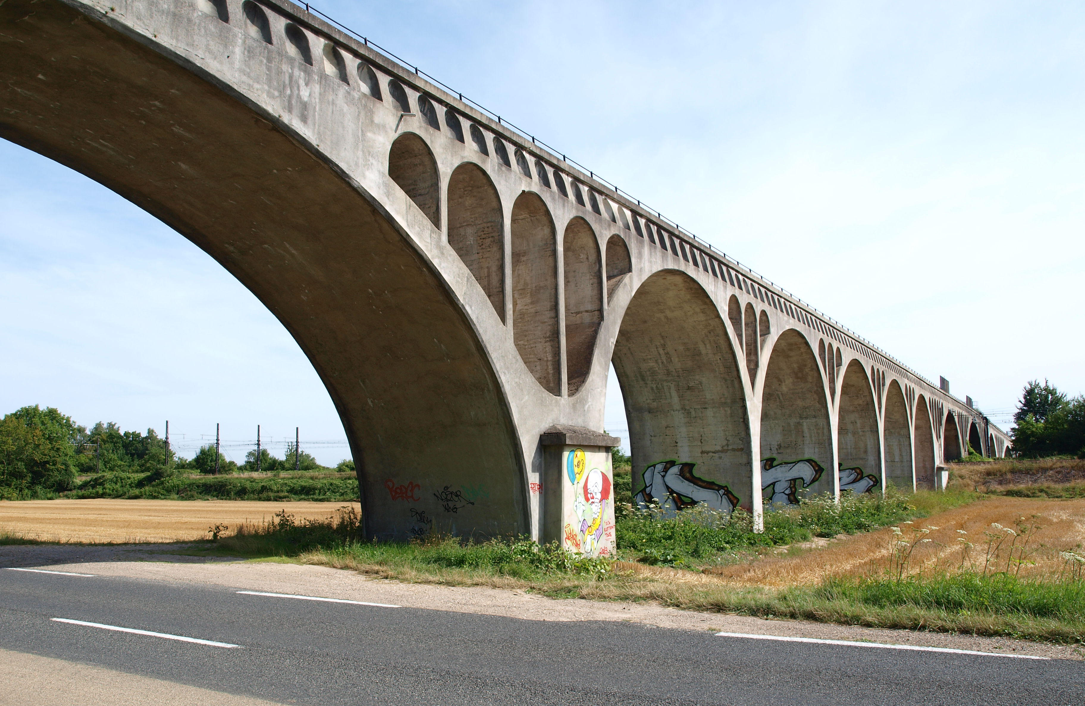 Villeperrot (Yonne, France) , l'aqueduc de la Vanne, sur la route de Pont-sur-Yonne.